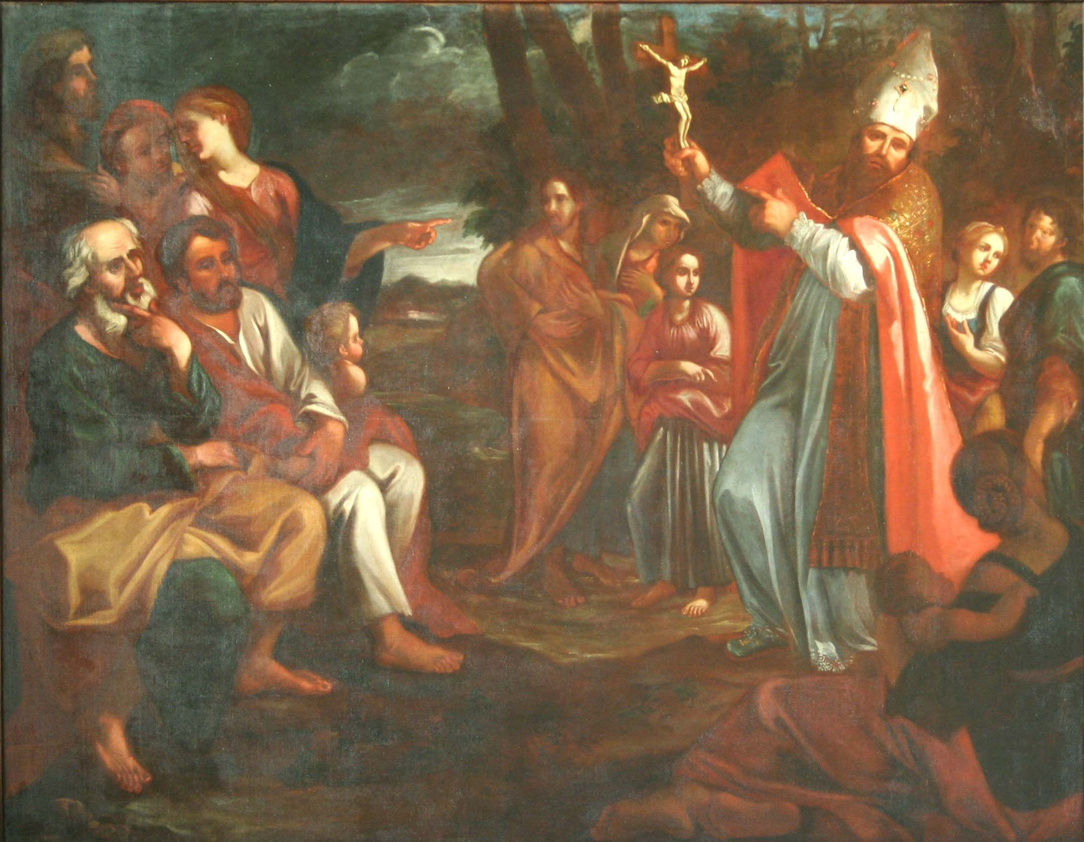 Tableau de Louis Court (1670-1733) placé dans la Cathédrale Notre-Dame-et-Saint-Arnoux de Gap (Hautes-Alpes) représentant saint Arnoux en train de prêcher.